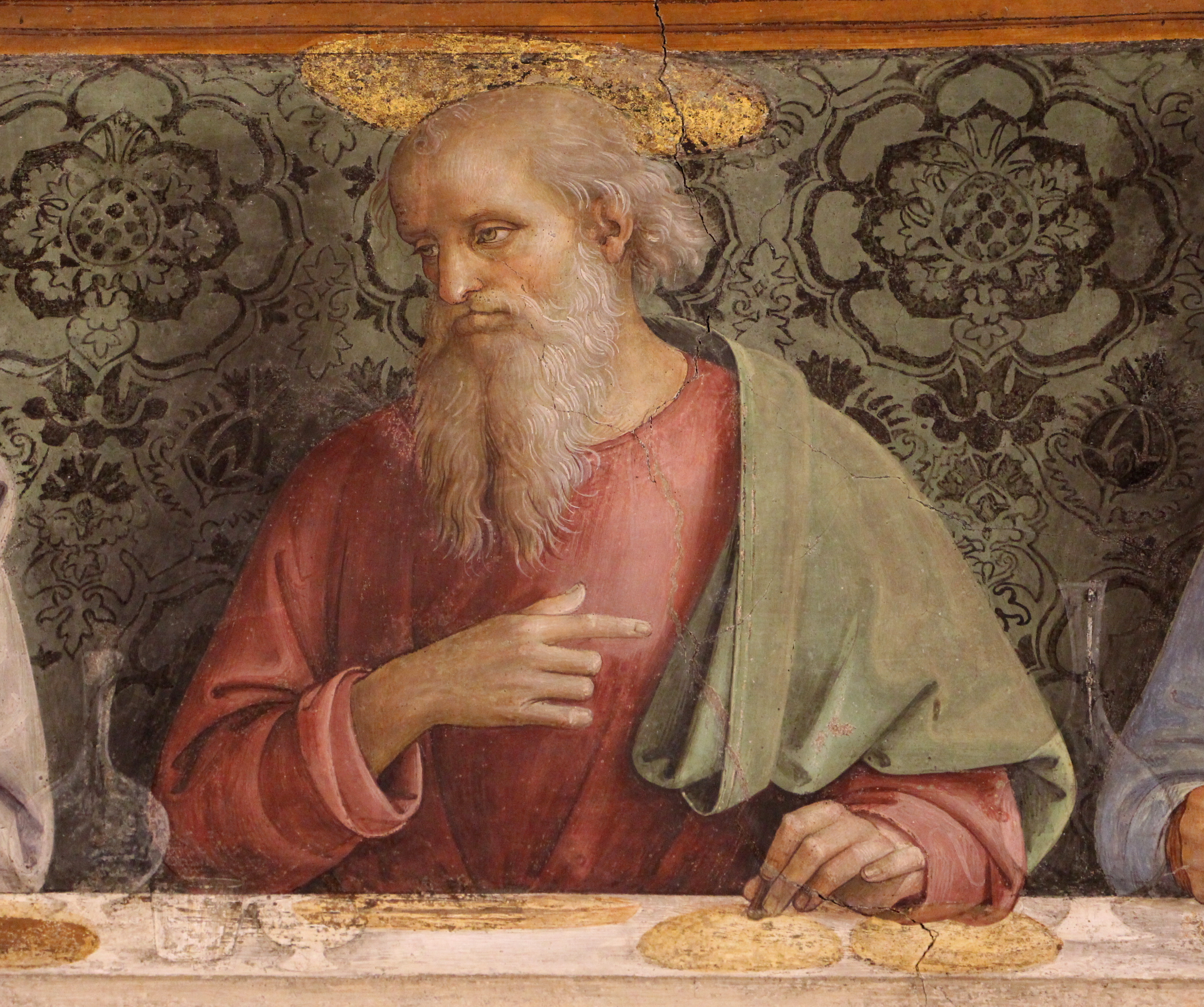 Cenacolo di Fuligno - MIBAC The making of this document was supported by Wikimedia CH. (Submit your project!) For all the files concerned, please see the category Supported by Wikimedia CH. This is a photo of a monument which is part of cultural heritage of Italy.